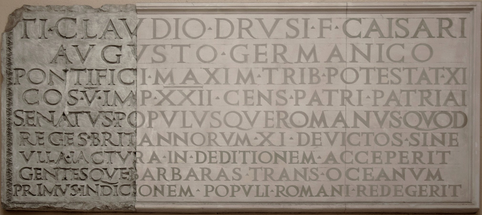 Inscription reconstituée de l'arc de Claude de 52.Musée de la Civilisation romaine, EUR, Rome.